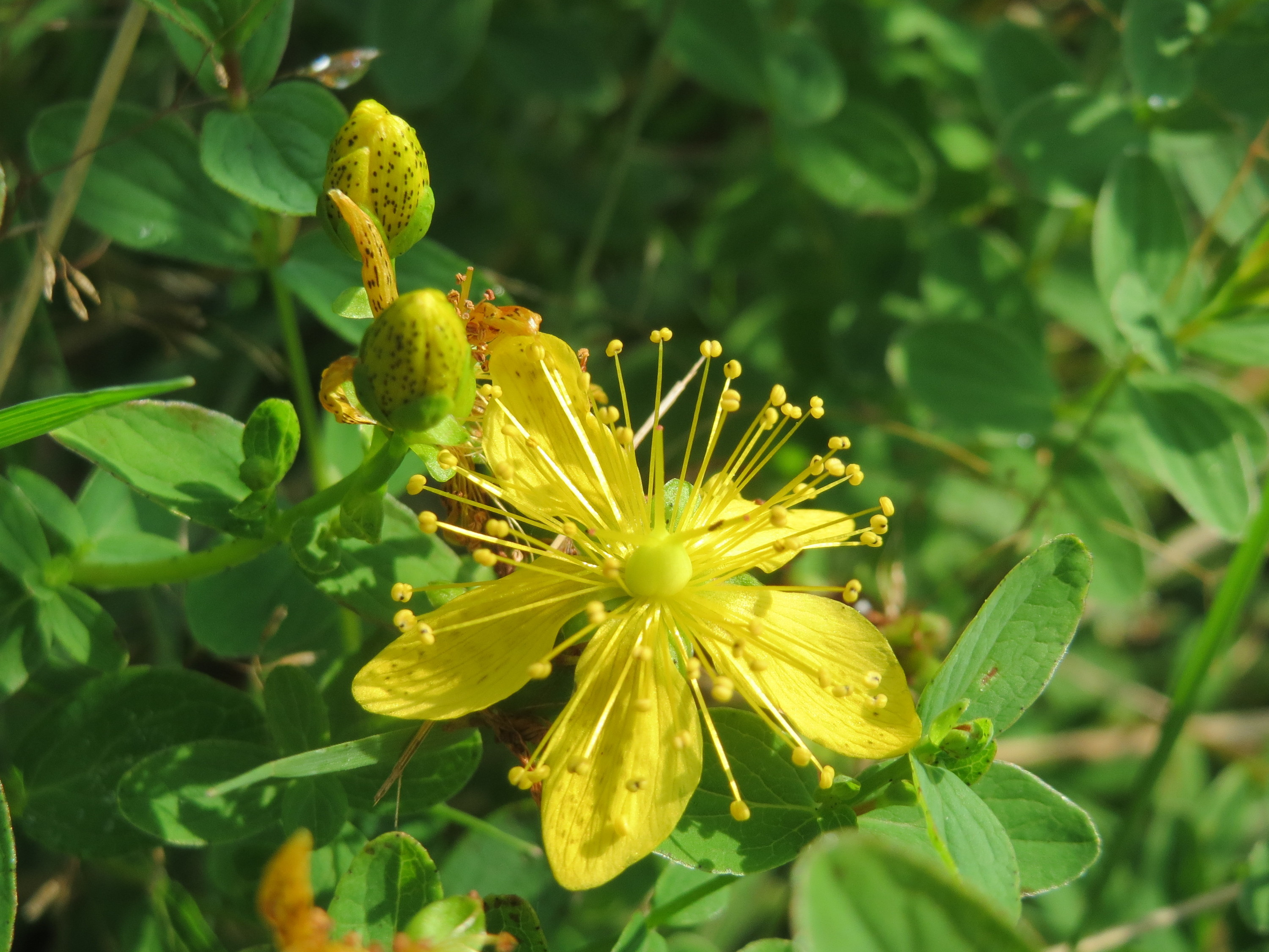 Geflecktes Johanniskraut (Hypericum maculatum) im Naturschutzgebiet Mürmes